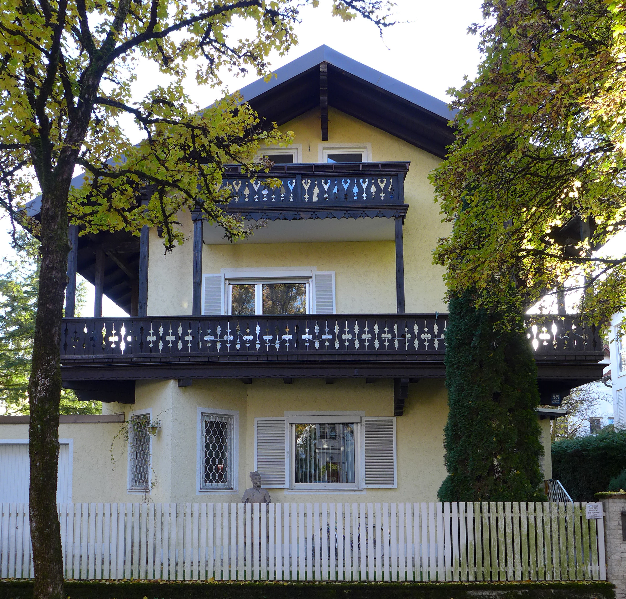 Marschnerst 55, München